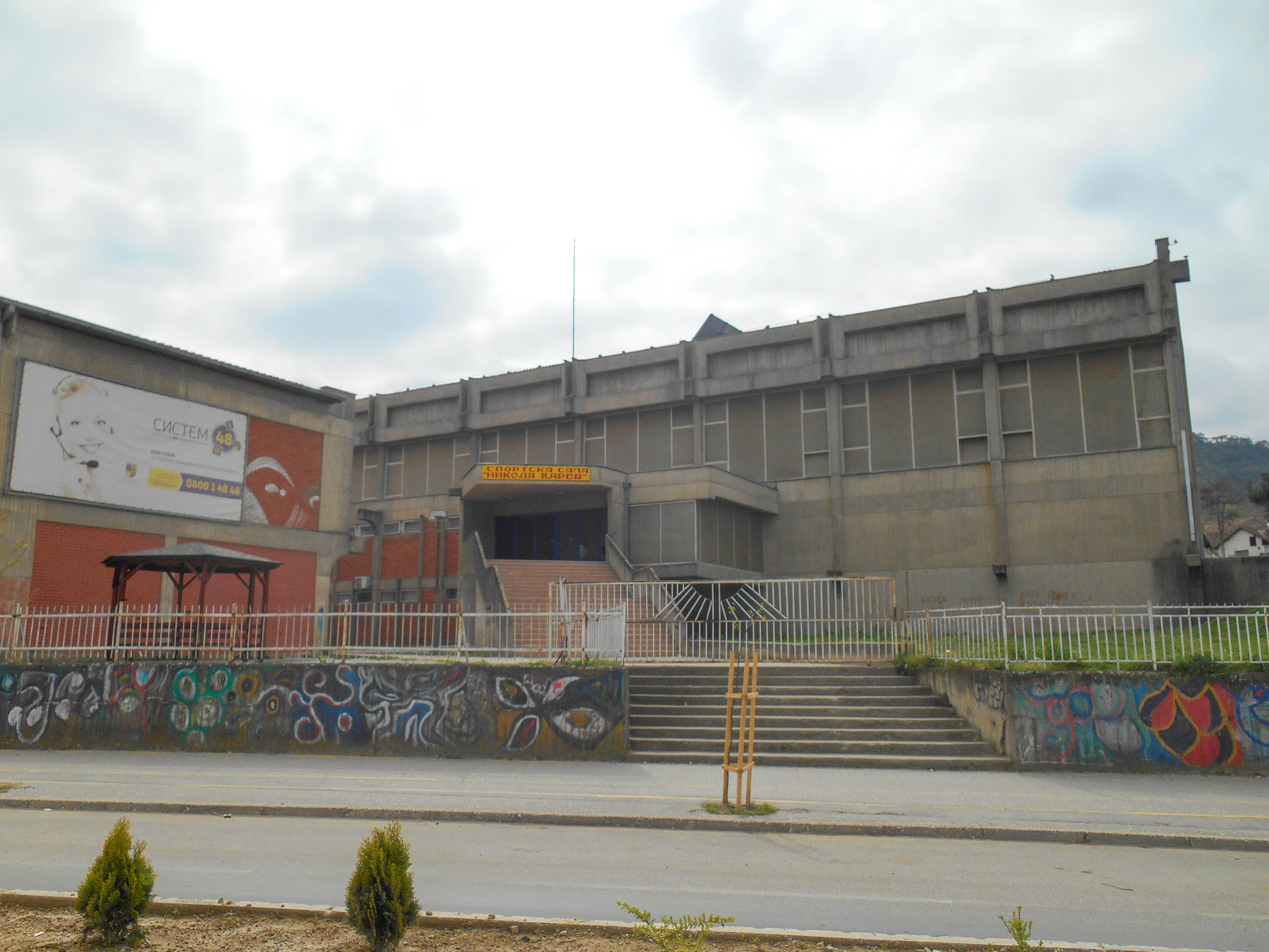 Училиште Никола Карев